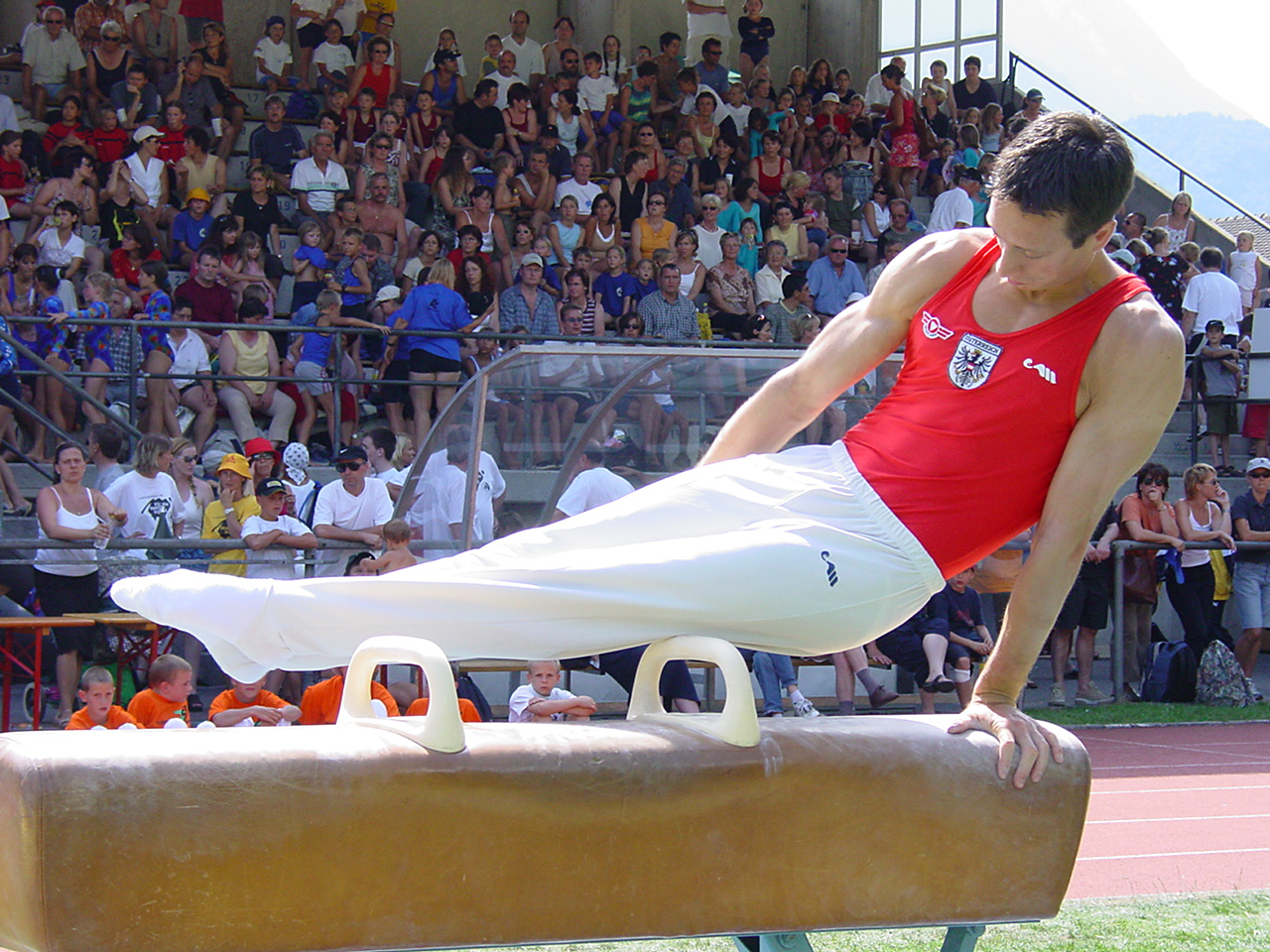 Kunstturner Marco Baldauf beim Landesjugendturnfest 2003 in Bludenz